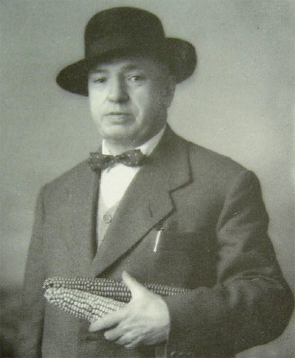 Cruz Gallastegi helduaroan